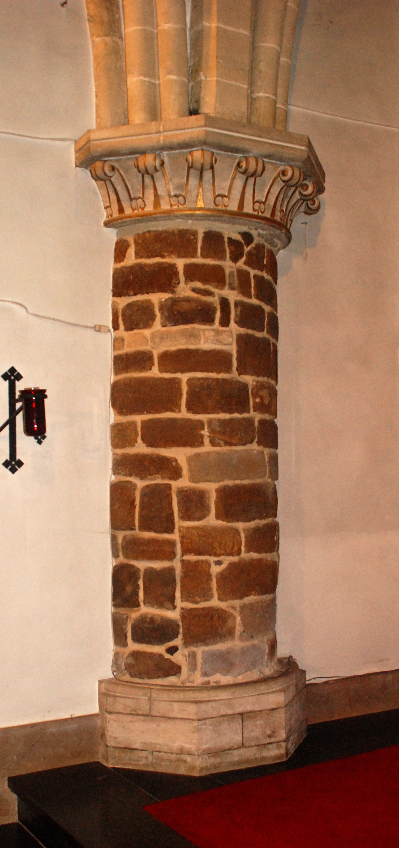 Belgique - Brabant wallon - Chaumont-Gistoux - Église Saint-Bavon de Chaumont